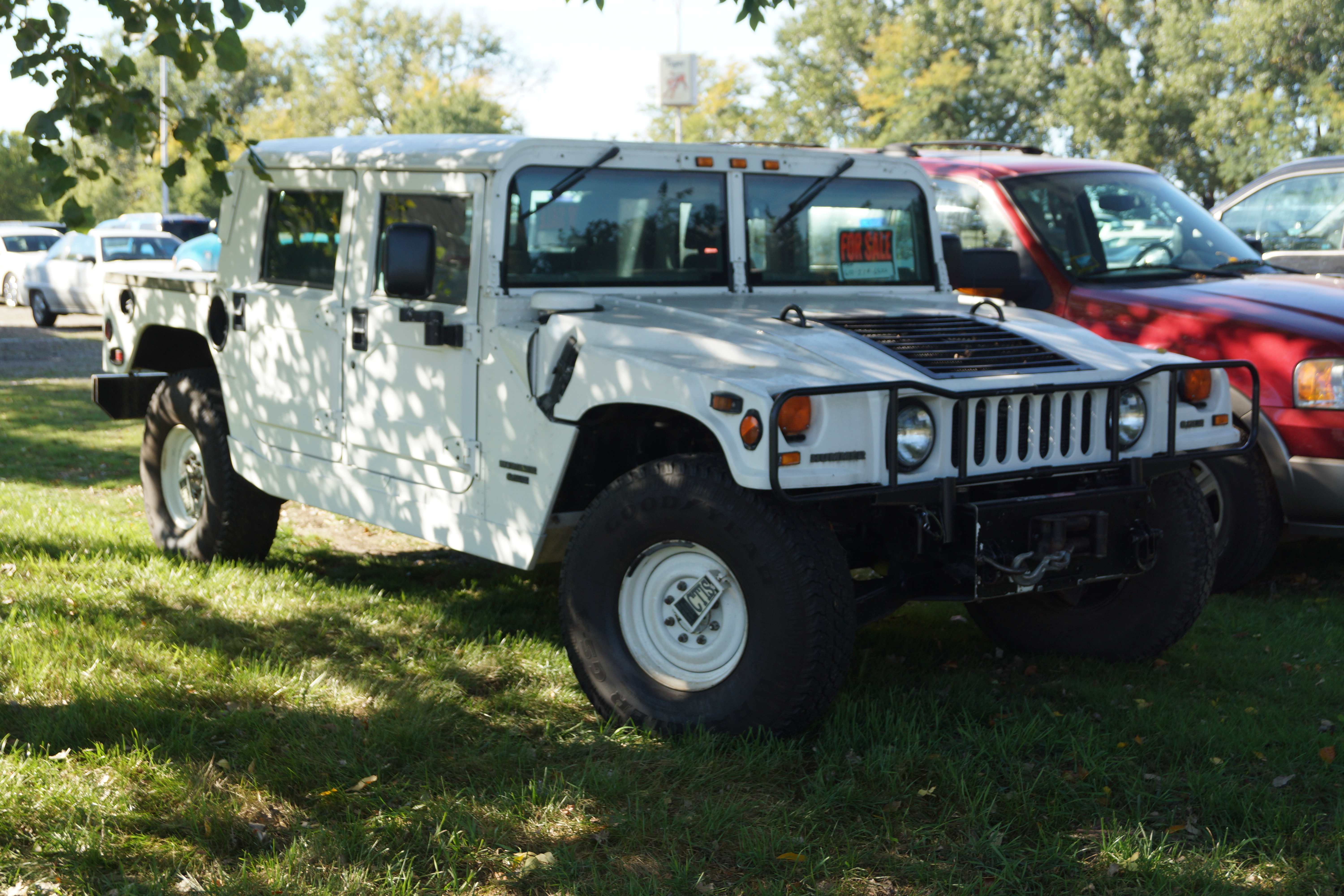 1997 Hummer H1